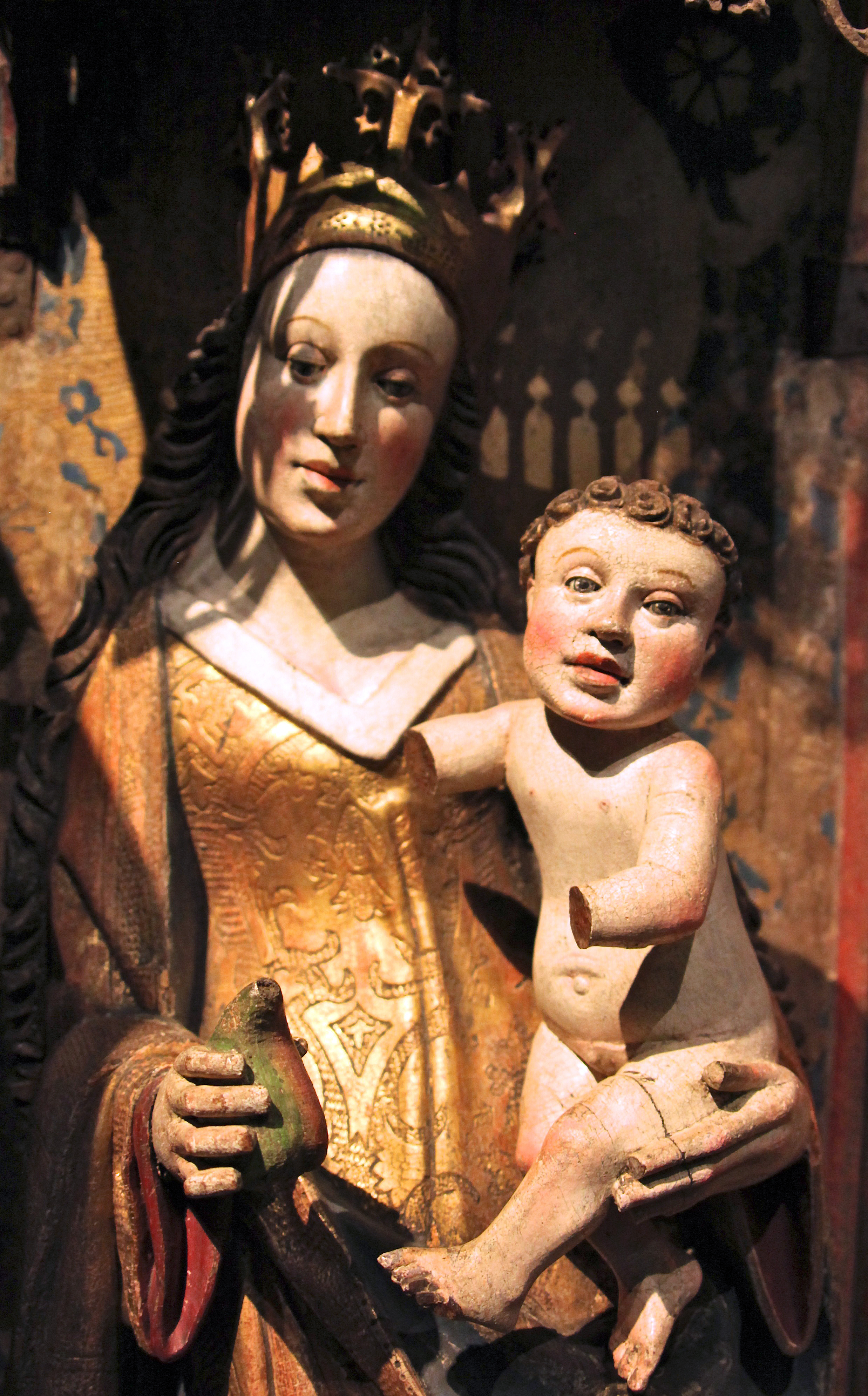 Alterskap fra Brekke kirke